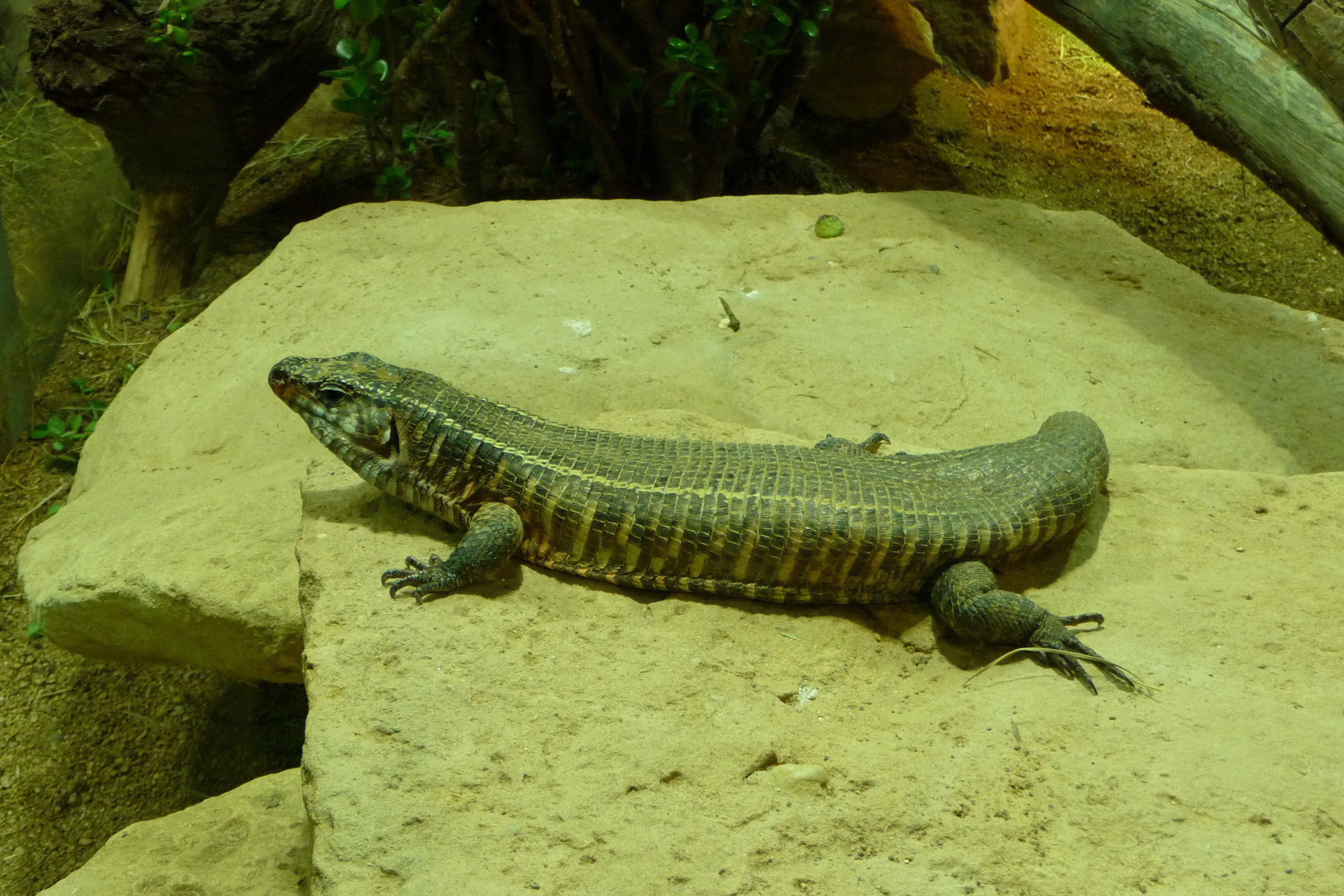 Reptilium Landau